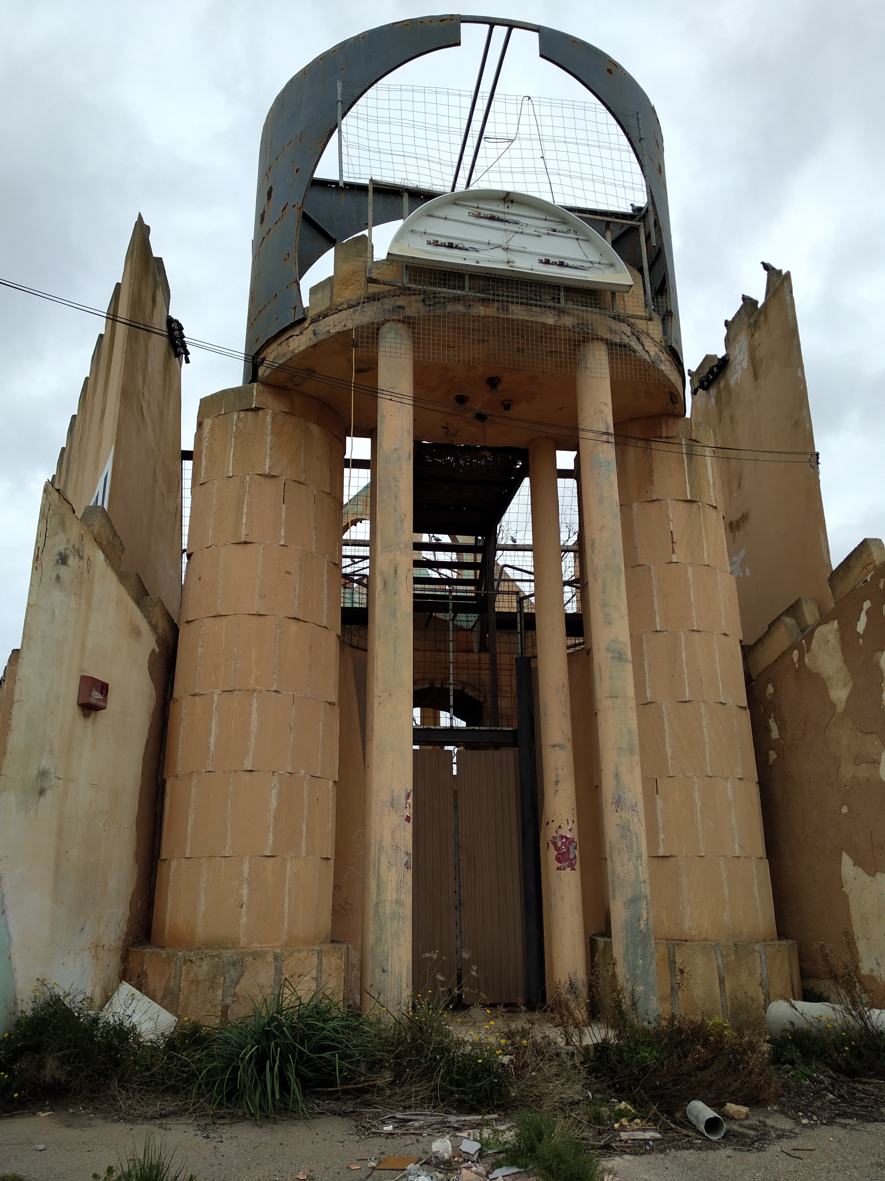 Entrada de Dhraa